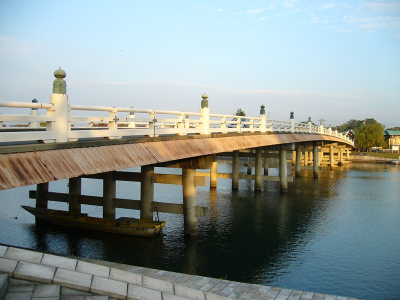 瀬田の唐橋 西南詰から